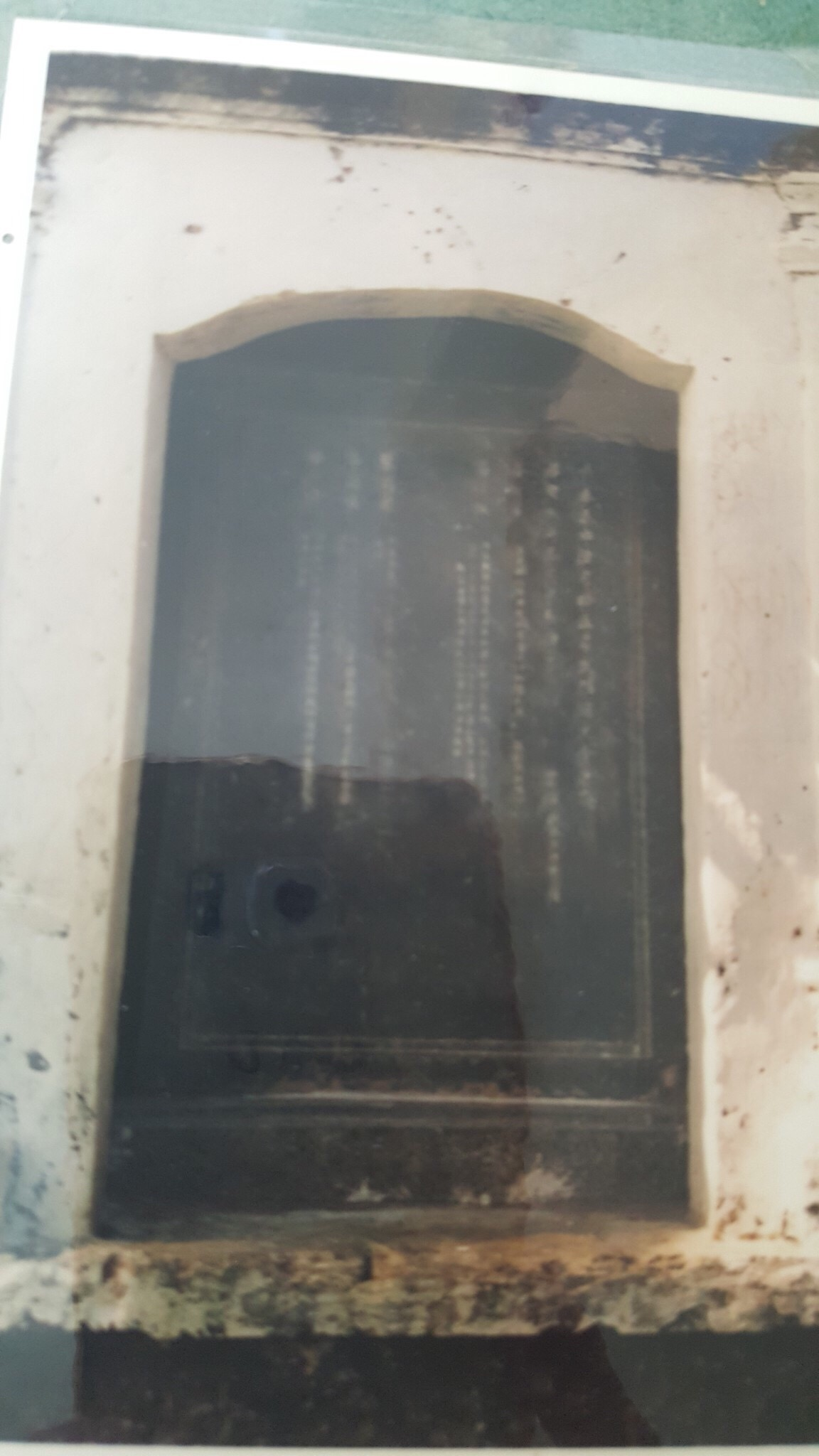 Đến ngày nay, bia đá tại Đình Võ Liệt vẫn còn lưu giữ tên tuổi Tiến sĩ Phan Nhân Tường đậu Tiến sĩ của vùng